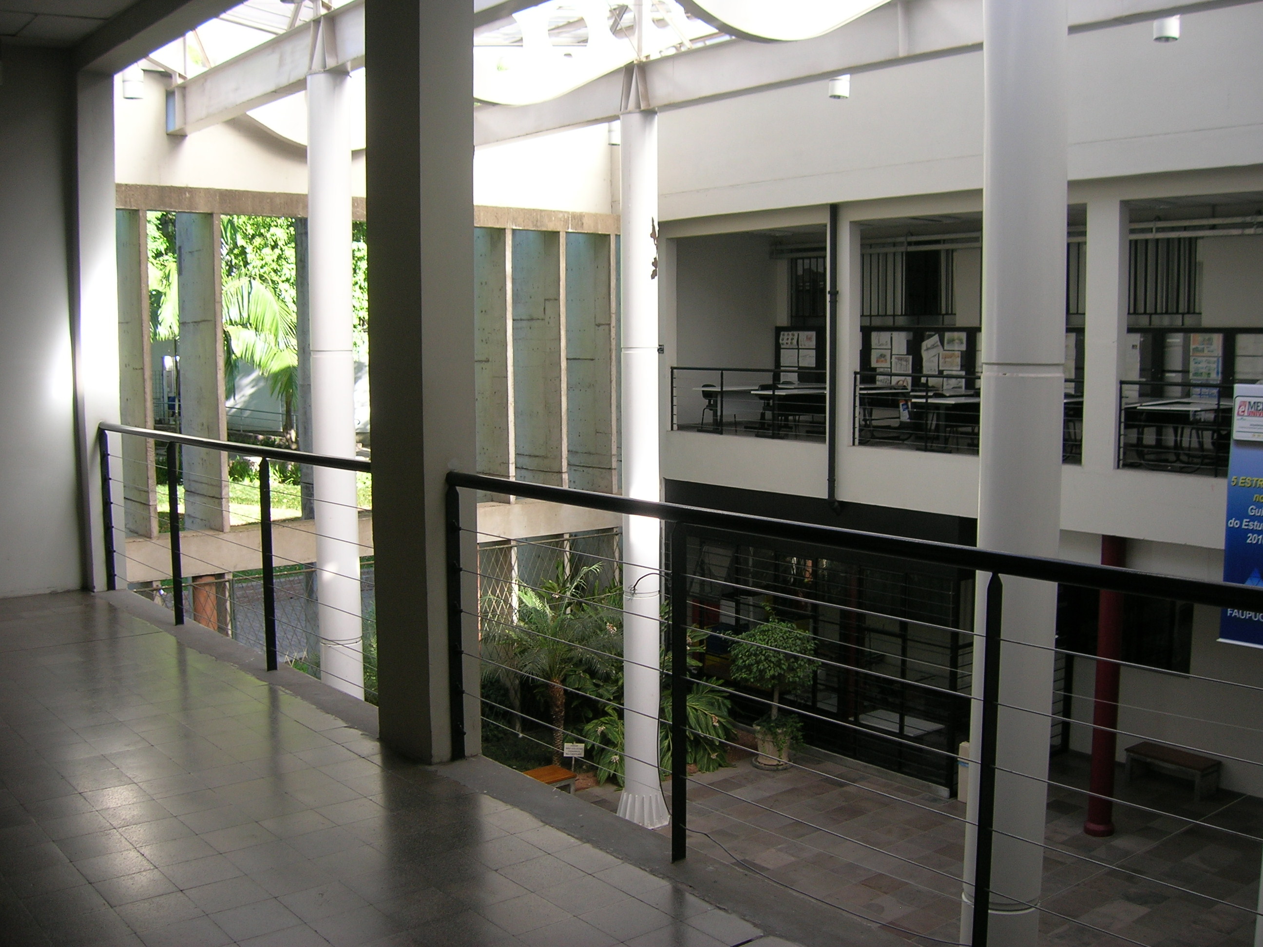 O saguão do prédio 9 da PUCRS, visto a partir do segundo andar.